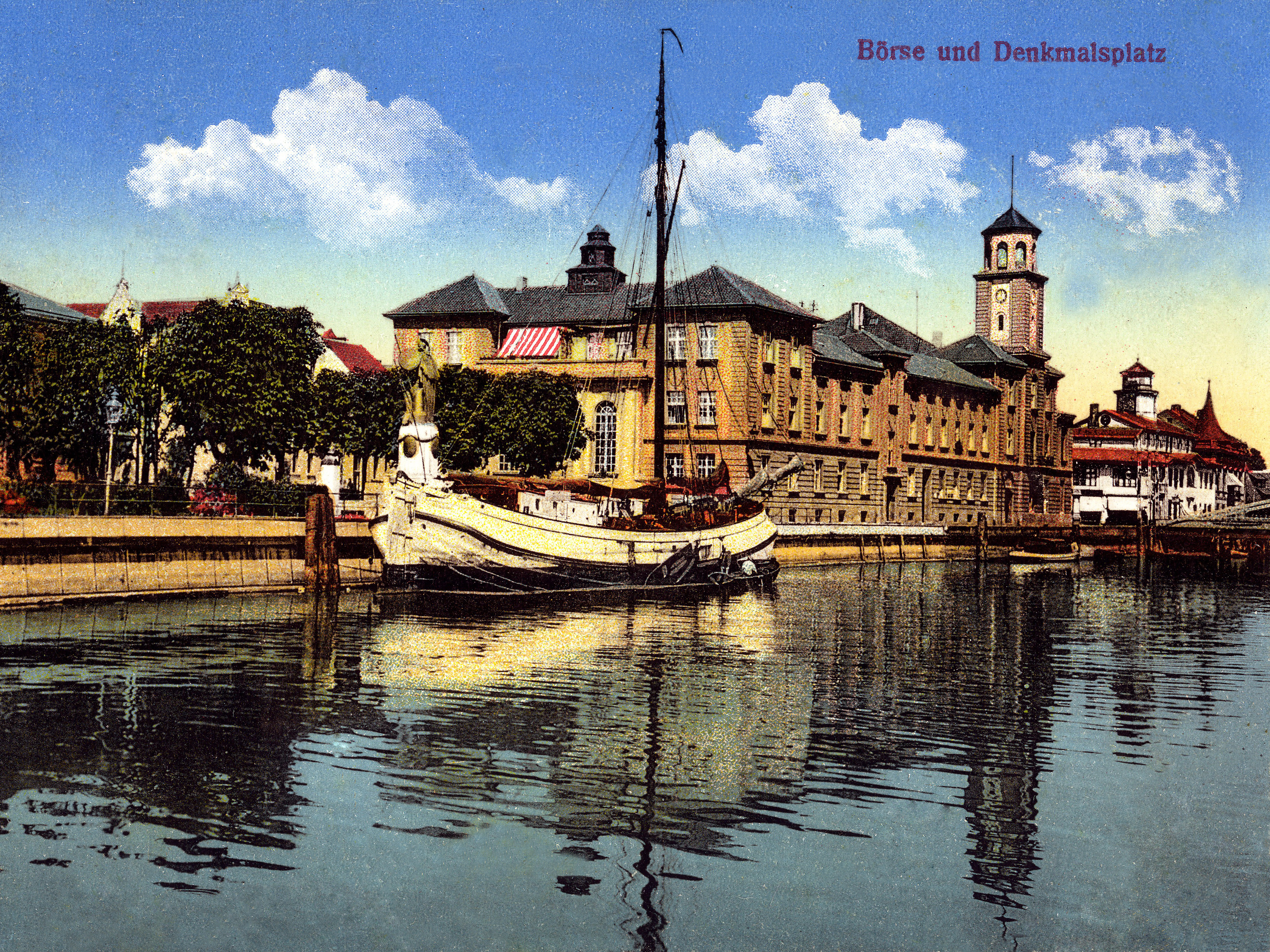 Socha Borussia (dnes je na stejném místě socha rybáře) v Klaipėdě. Pohled přes řeku Danė. Budovy na fotografii (s vyšší věžičkou - pošta, s nižší - Burza) již neexistují, byly zničeny koncem II. svět. války, trosky odklizeny po válce. Mezi dvěma největšími budovami vpravo je patrný okraj mostu Biržos tiltas (Burzovní most). Pohled k východoseverovýchoduLietuvių: Borusijos skulptūra (dabar vietoj jos - žvejo). Žvilgsnis per Danę, matomas Biržos tilto galiukas. Klaipėda